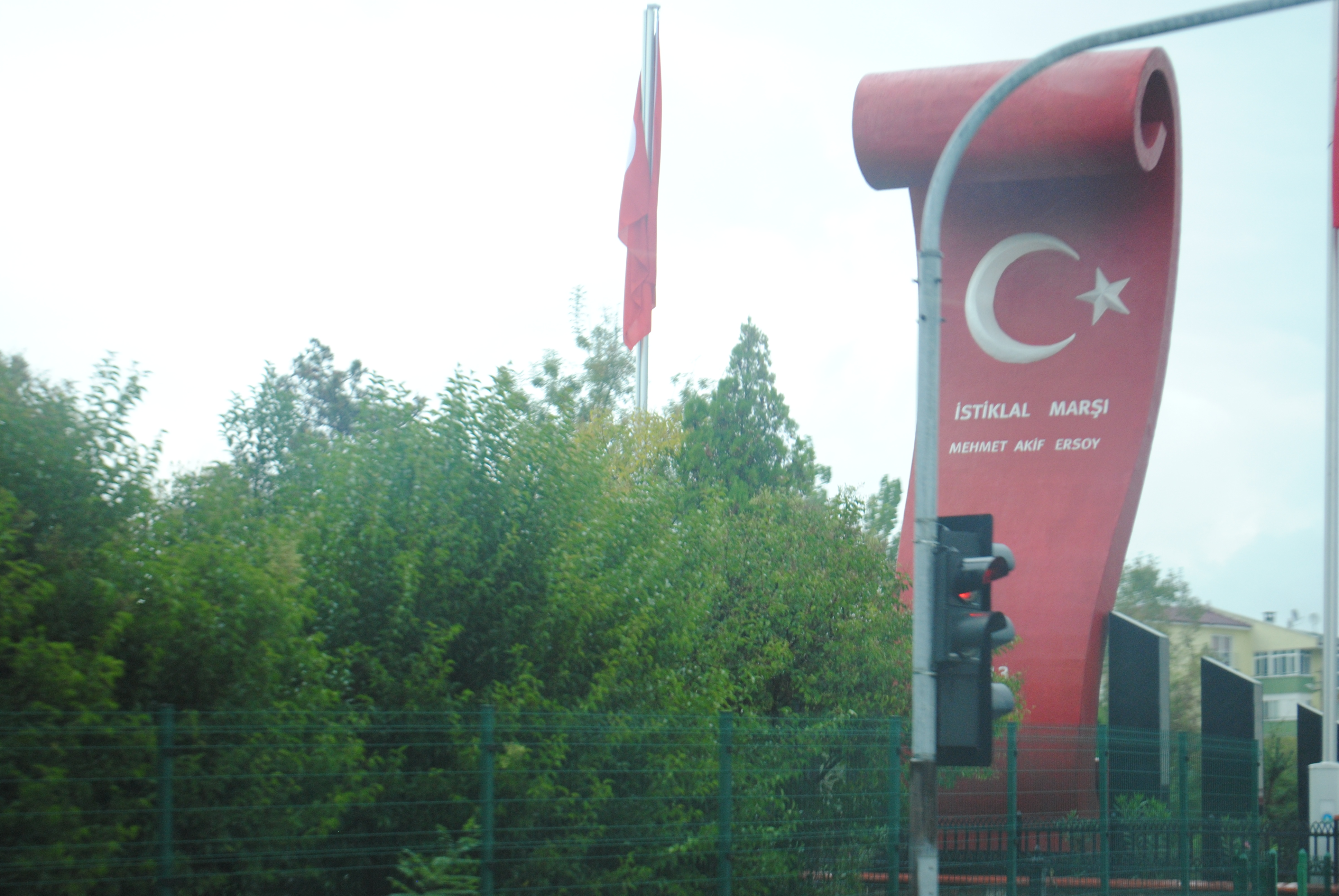 Bartın'dan çeşitli görüntüler